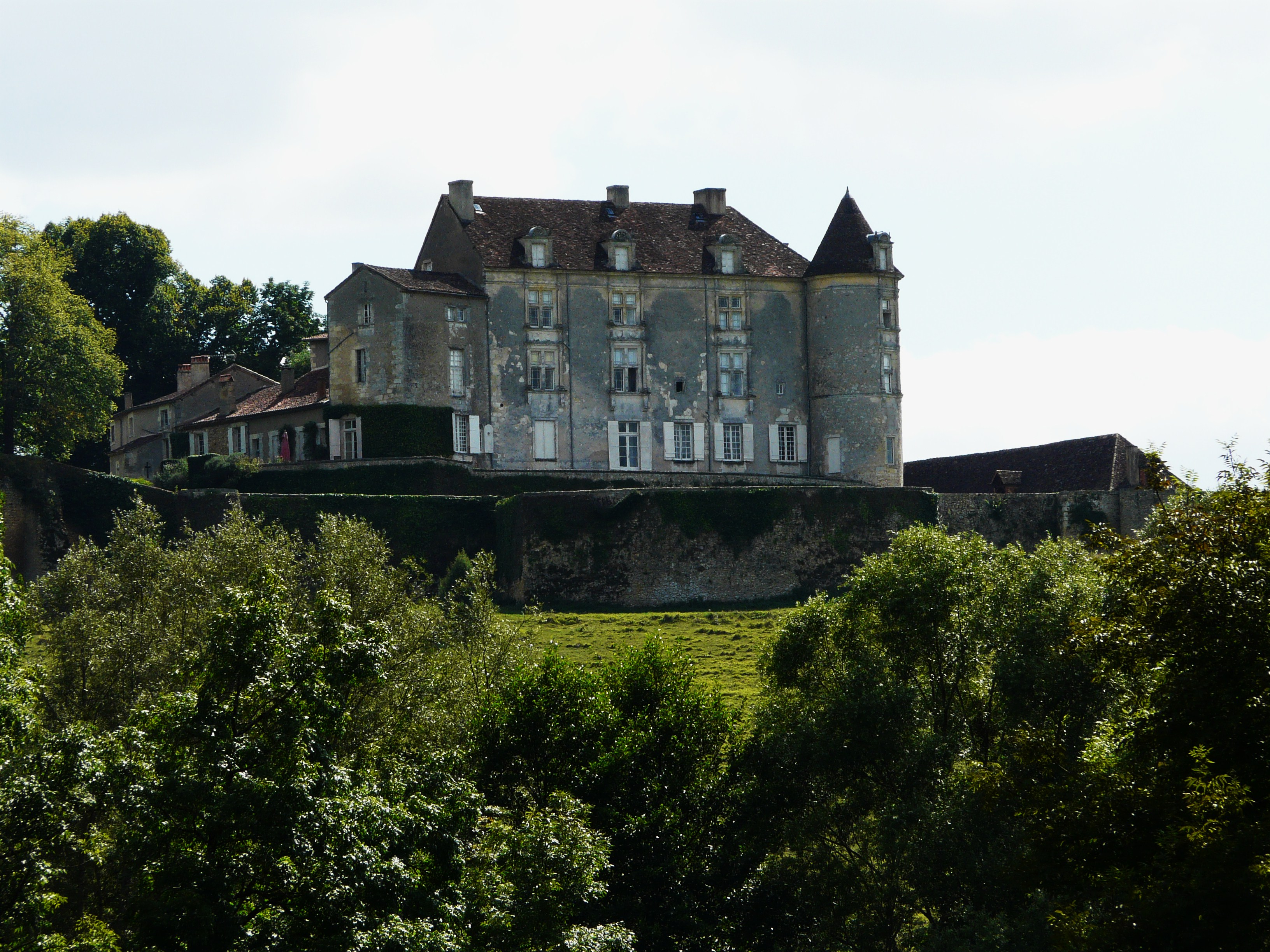 Château de Montréal, à Issac, Dordogne, France Object location45° 00′ 42″ N, 0° 25′ 52″ E